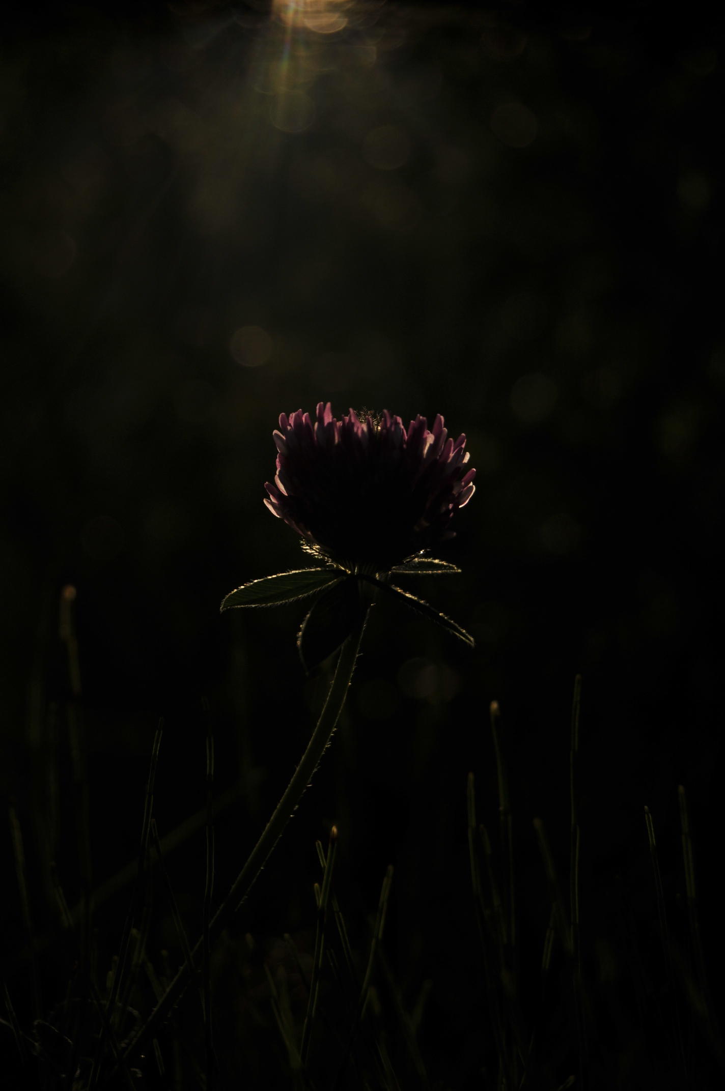 Rannåssjön i Östersund, Jämtland.